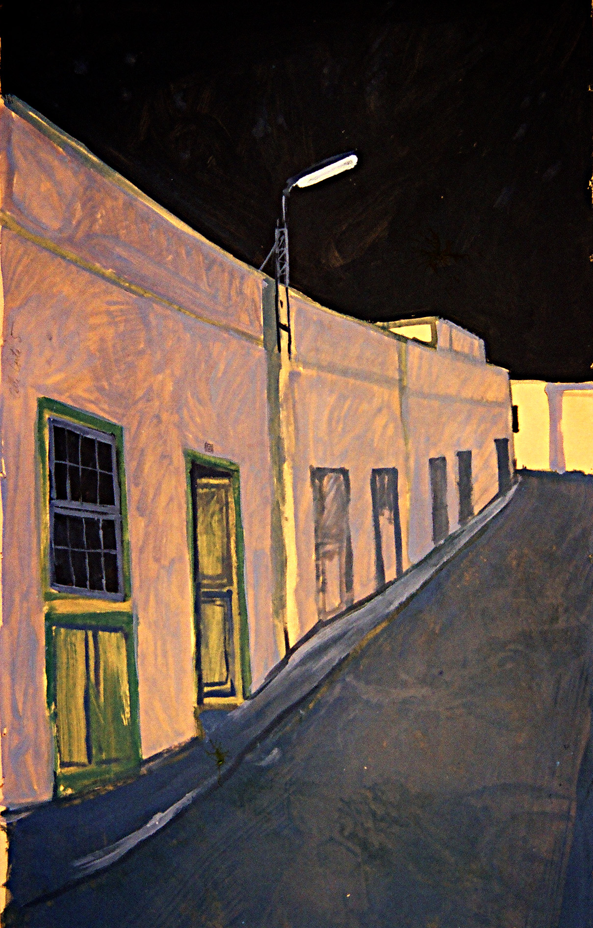 Die »Calle Corta« in San Miguel de Abona, Teneriffa.